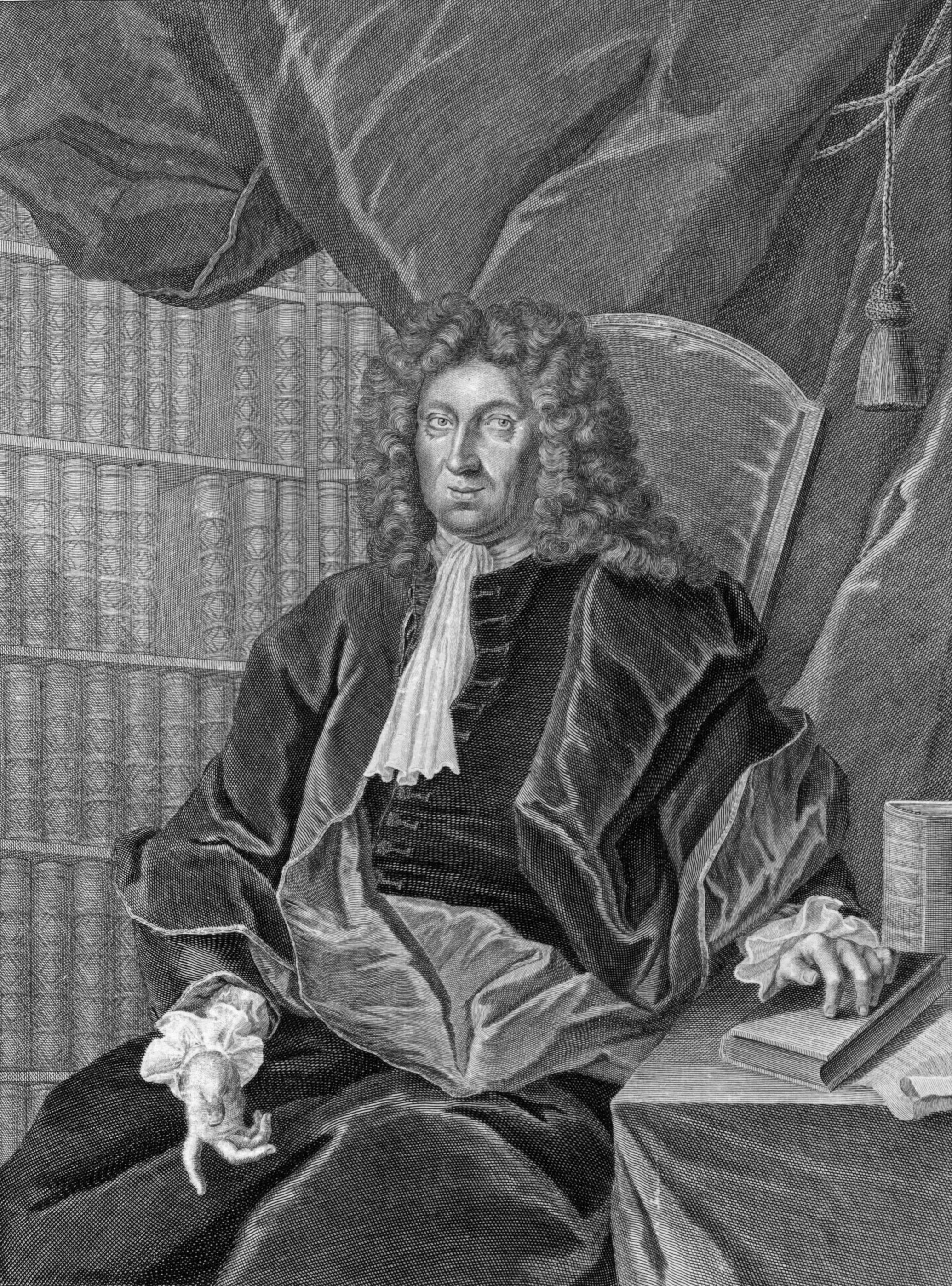 Kupferstich von Johann Heinrich Ernesti, Rektor der Thomasschule zu Leipzig